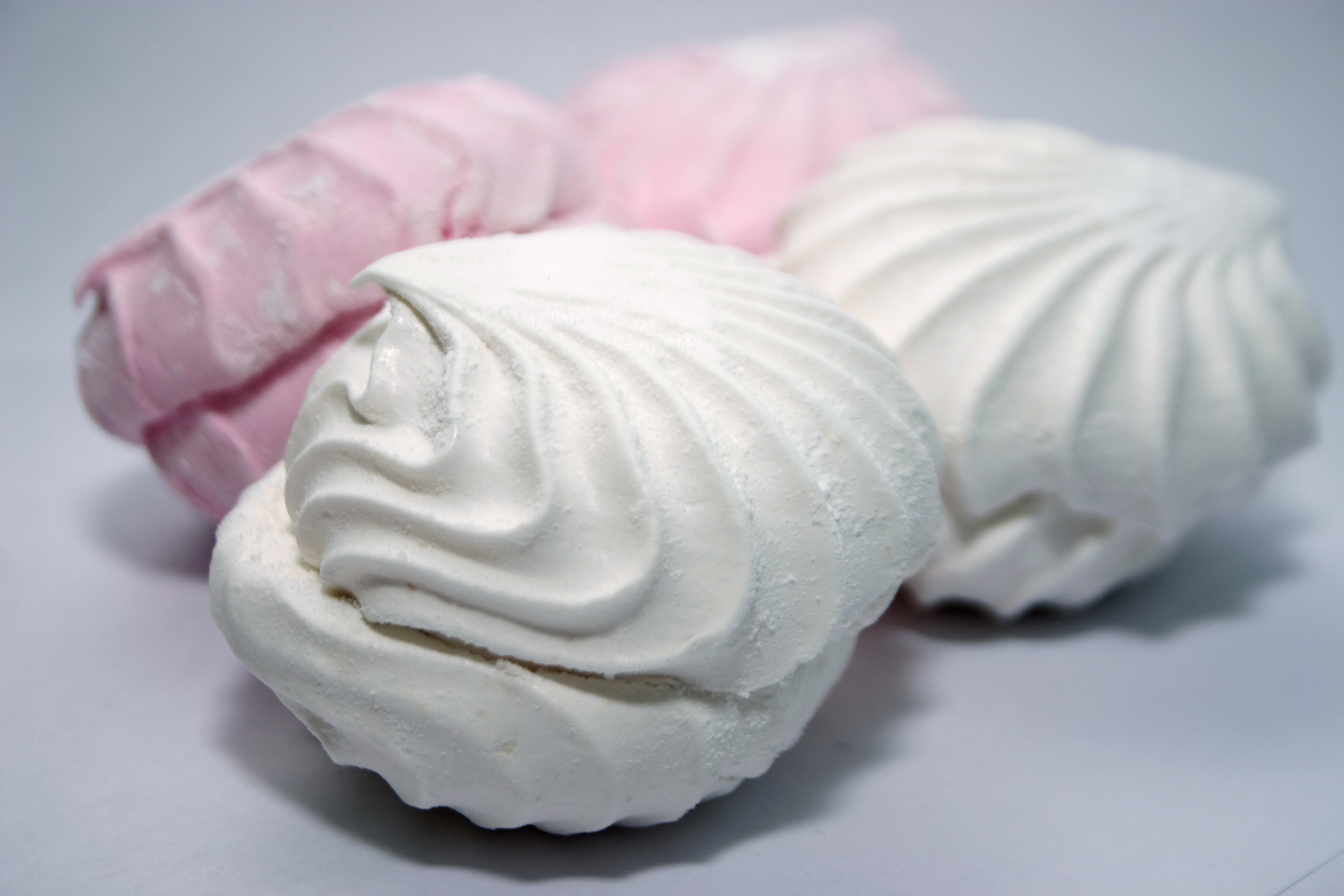 Зефир бело-розовый производства ОАО "Красный пищевик"